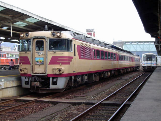 廃止直前の特急「いそかぜ」（国鉄キハ181系気動車） 益田駅にて撮影